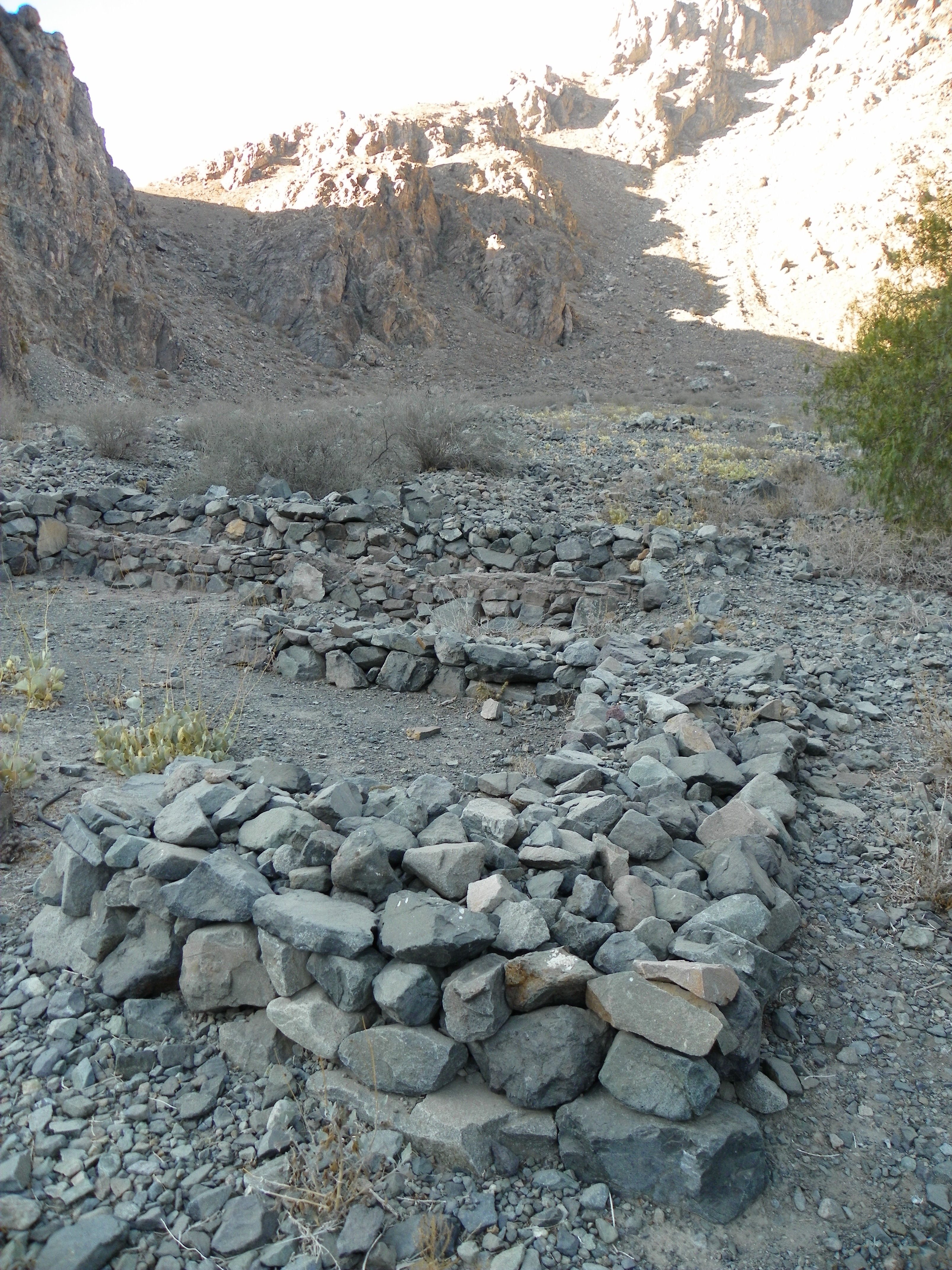 Pucará de Punta Brava This is a photo of a national monument in Chile: 336